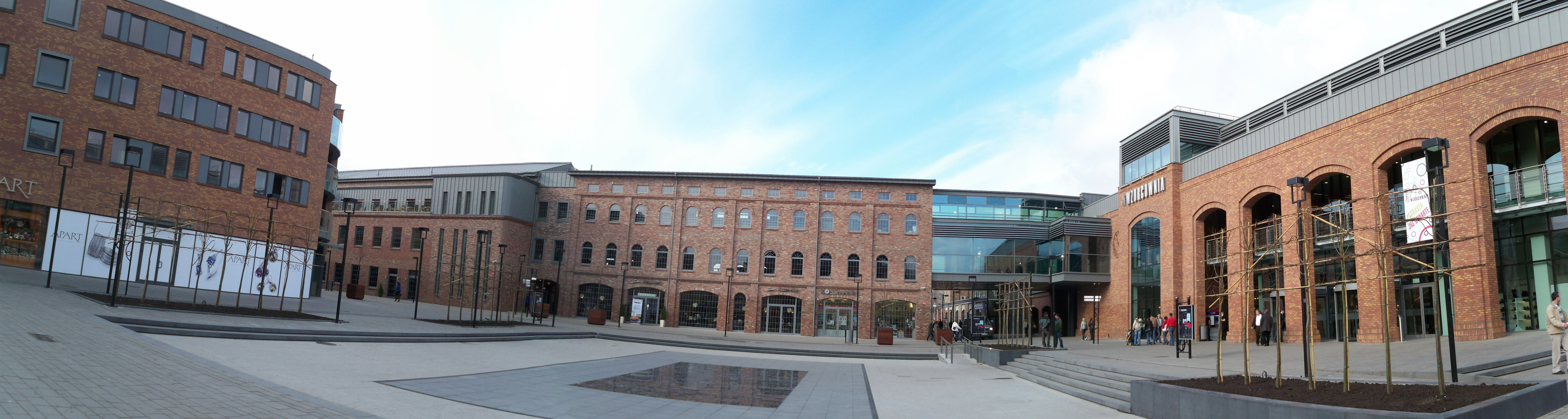 Wzorcownia Włocławek 2009 r.